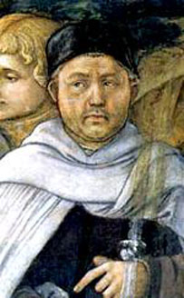 detail: Lippi, Self-portrait